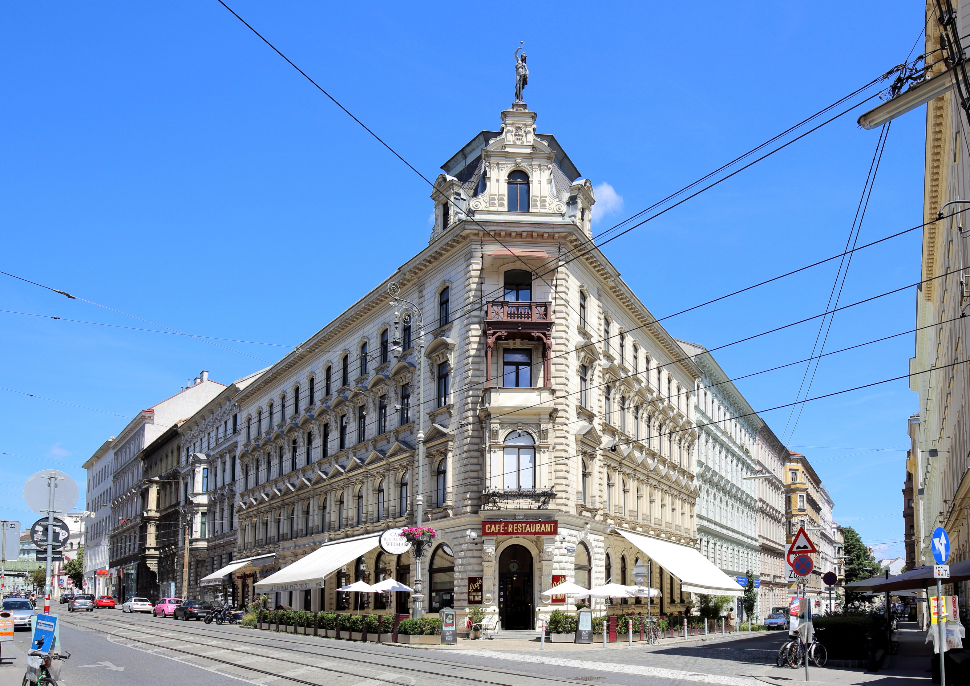 Café Weimar an der Adresse Währinger Straße 68 im 1. Bezirk der Bundeshauptstadt Wien.